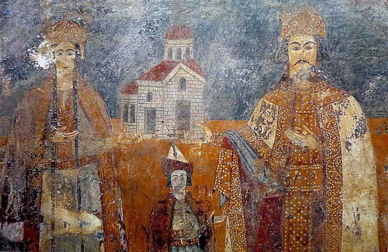 სამხრეთის კედელი, ლევან დადიანი